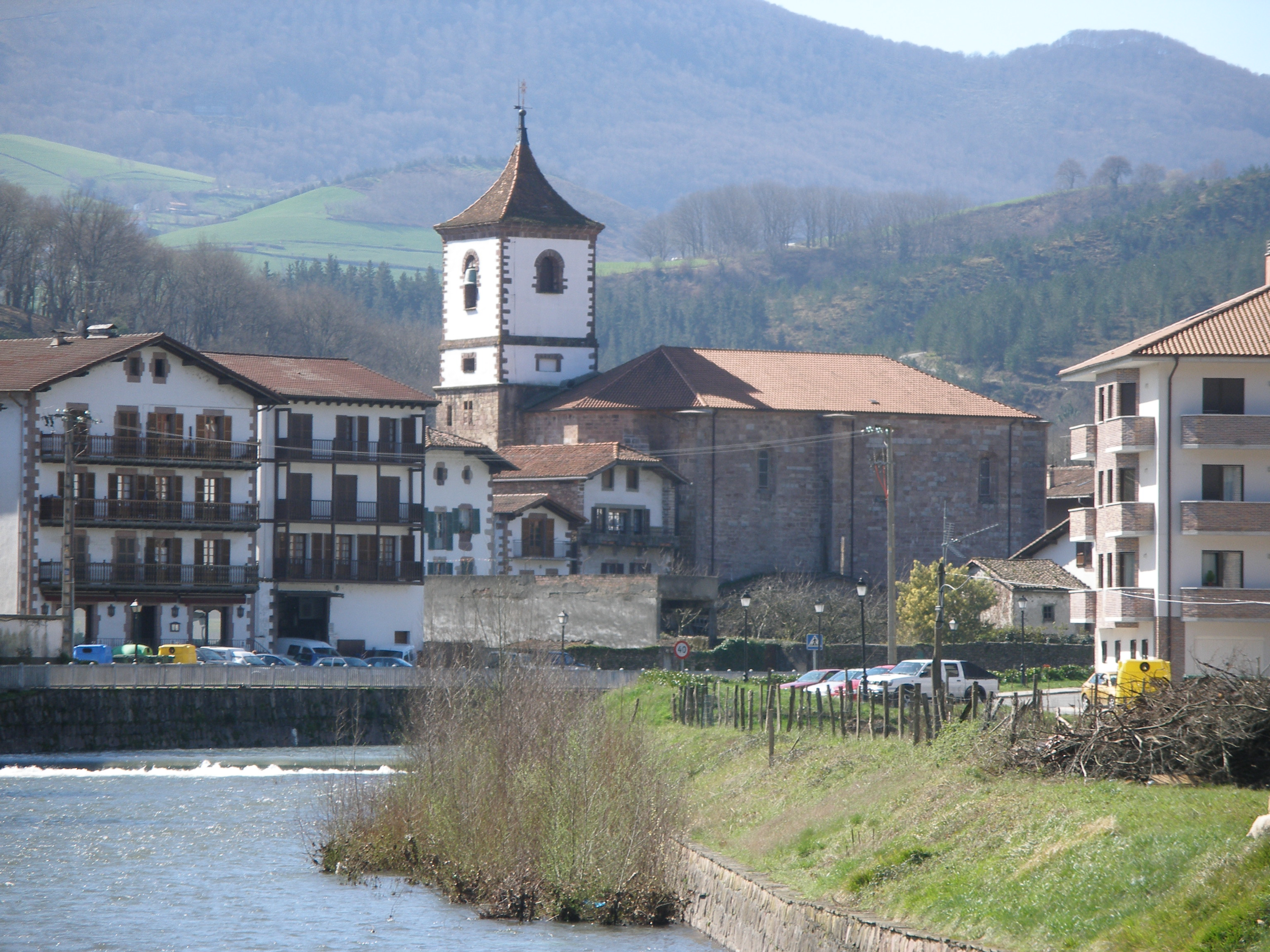 Doneztebe